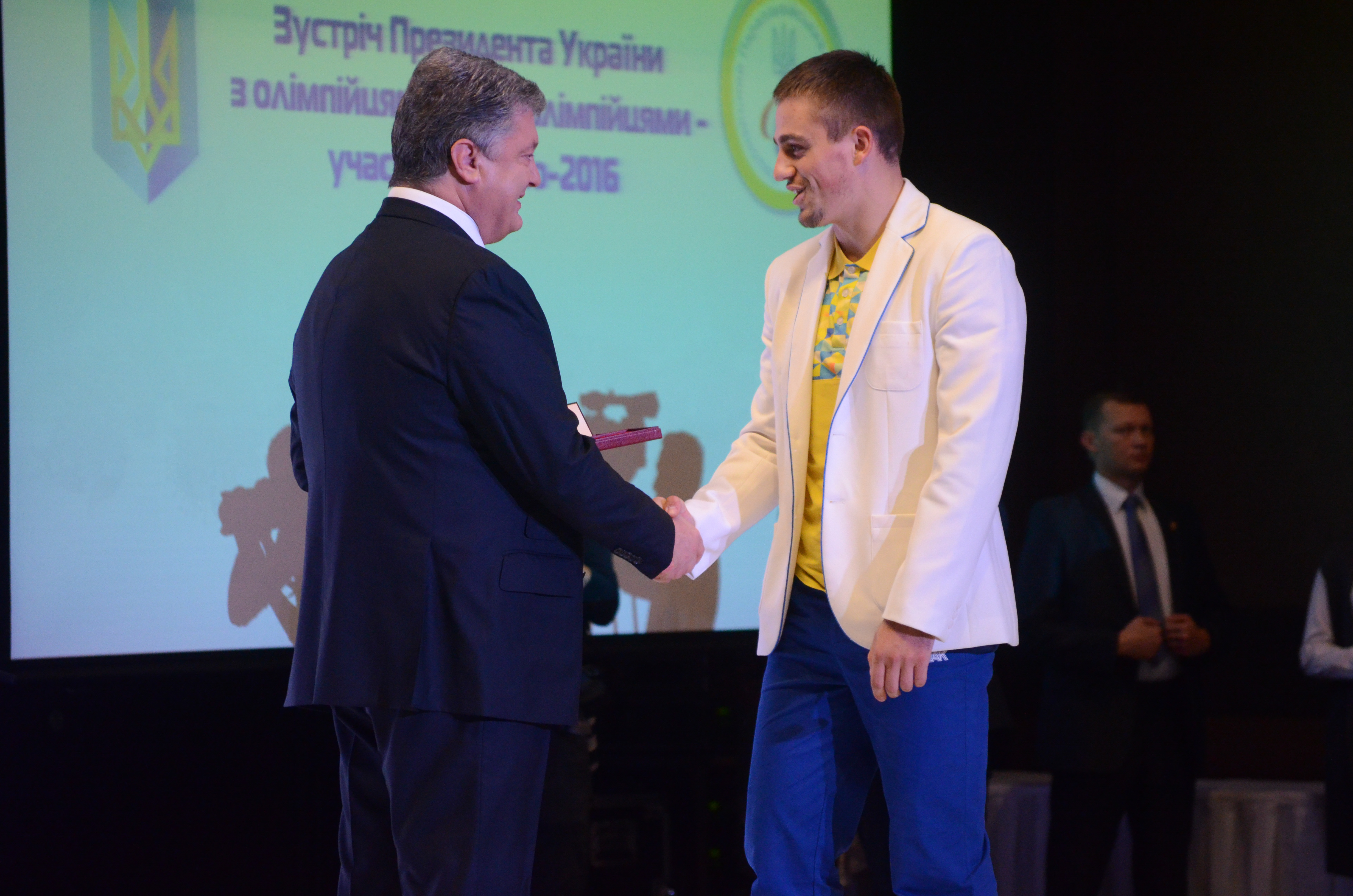 Зустріч Президента України з олімпійцями та паралімпійцями — учасниками Ріо-2016.